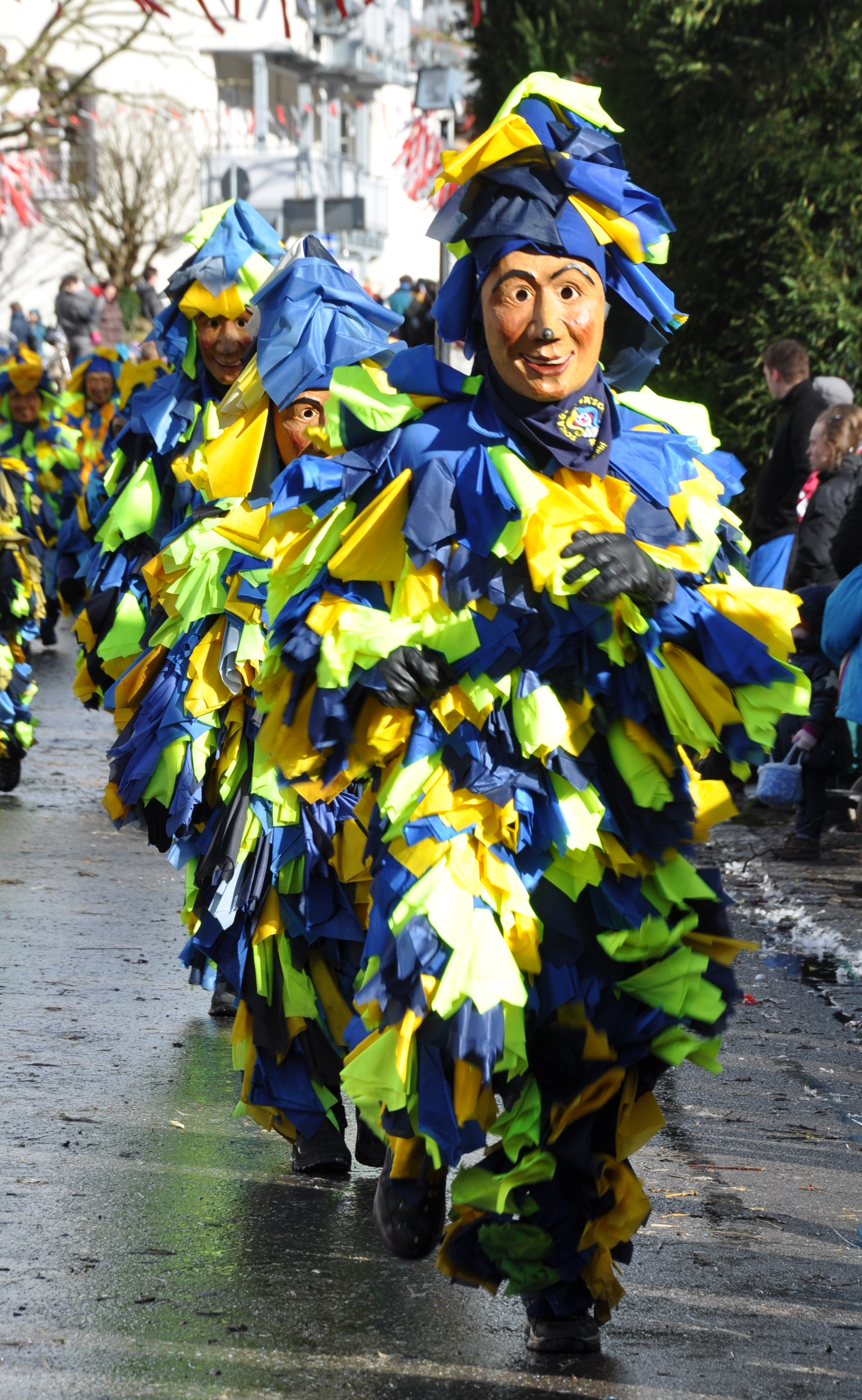 Narrenzunft Schlaggawäscher e. V. Oberkochen; Narrenfigur: Hamballe Fotografiert beim Ringtreffen des Alemannischen Narrenrings (ANR) 2014 in Weingarten; Narrensprung am 9. Februar 2014